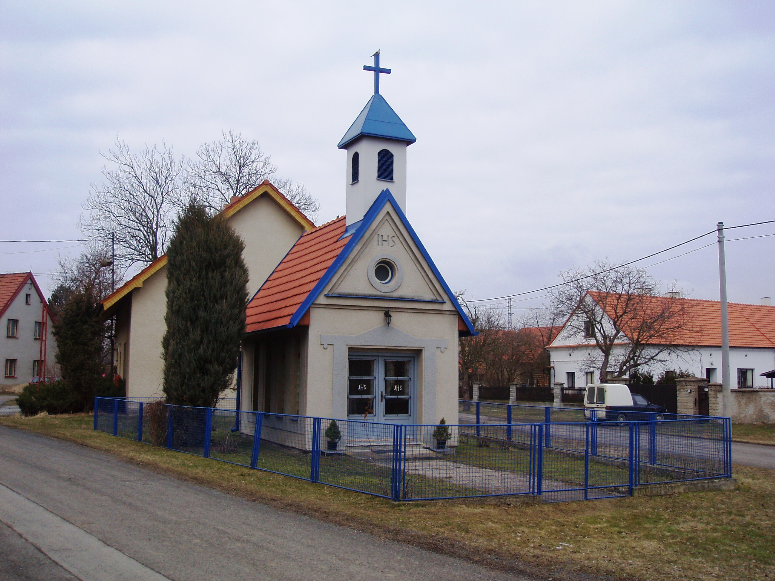 Kaple ve vísce Lhotka u Dobříše,založená a vysvěcená arcibiskupem Tomáškem v šedesátých letech